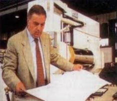 Marco Terragni at the Plast fair in Dùsseldorf, Germany 1999